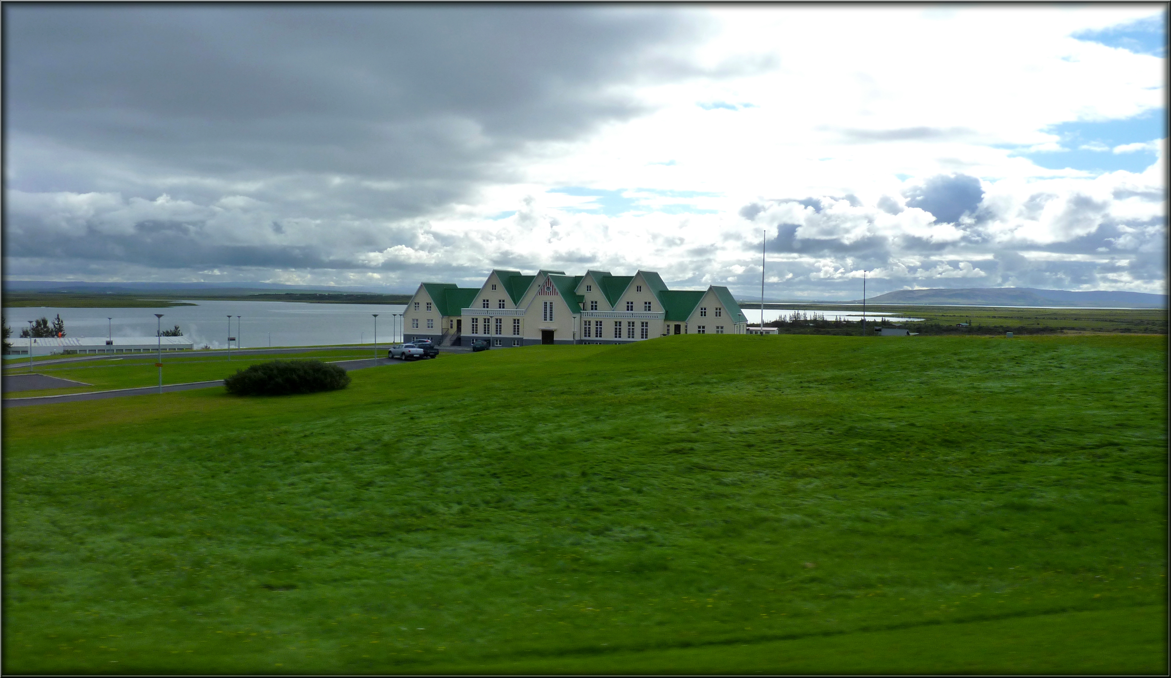 laugarvatn